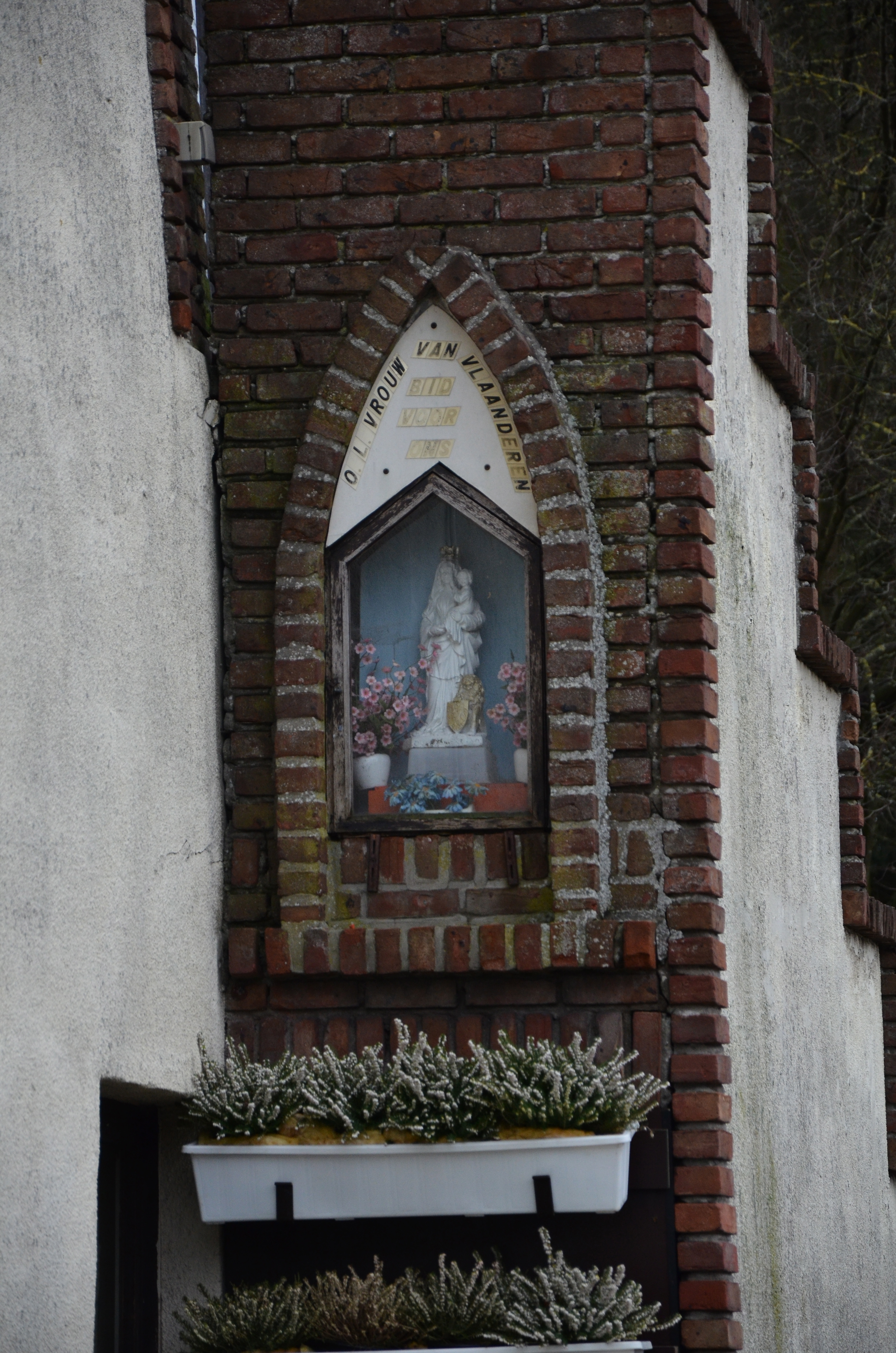 Kapelletje aan Dorpsstraat 84, Wuustwezel